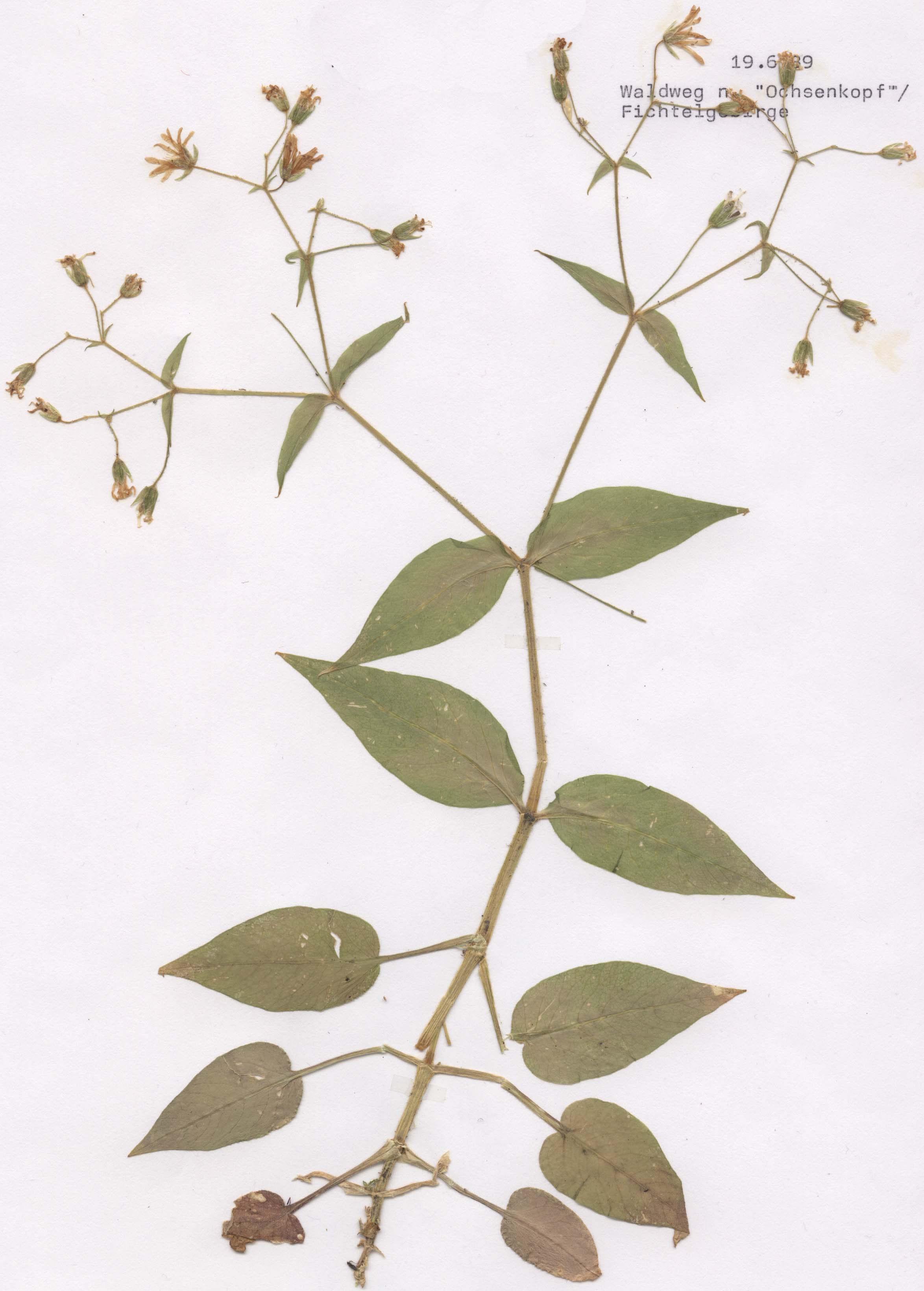 Stellaria nemorum, eigener Herbarbeleg von 1989, Fichtelgebirge